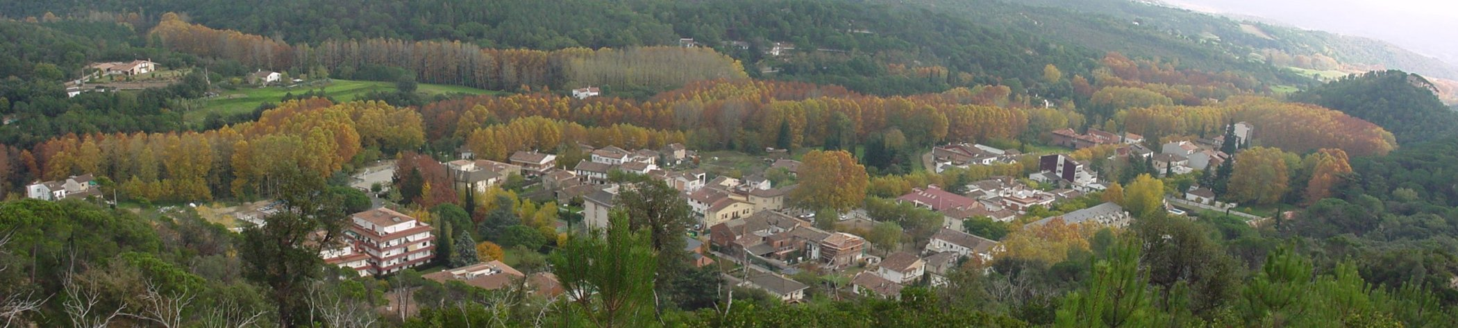 Panoràmica del nucli de Gualba